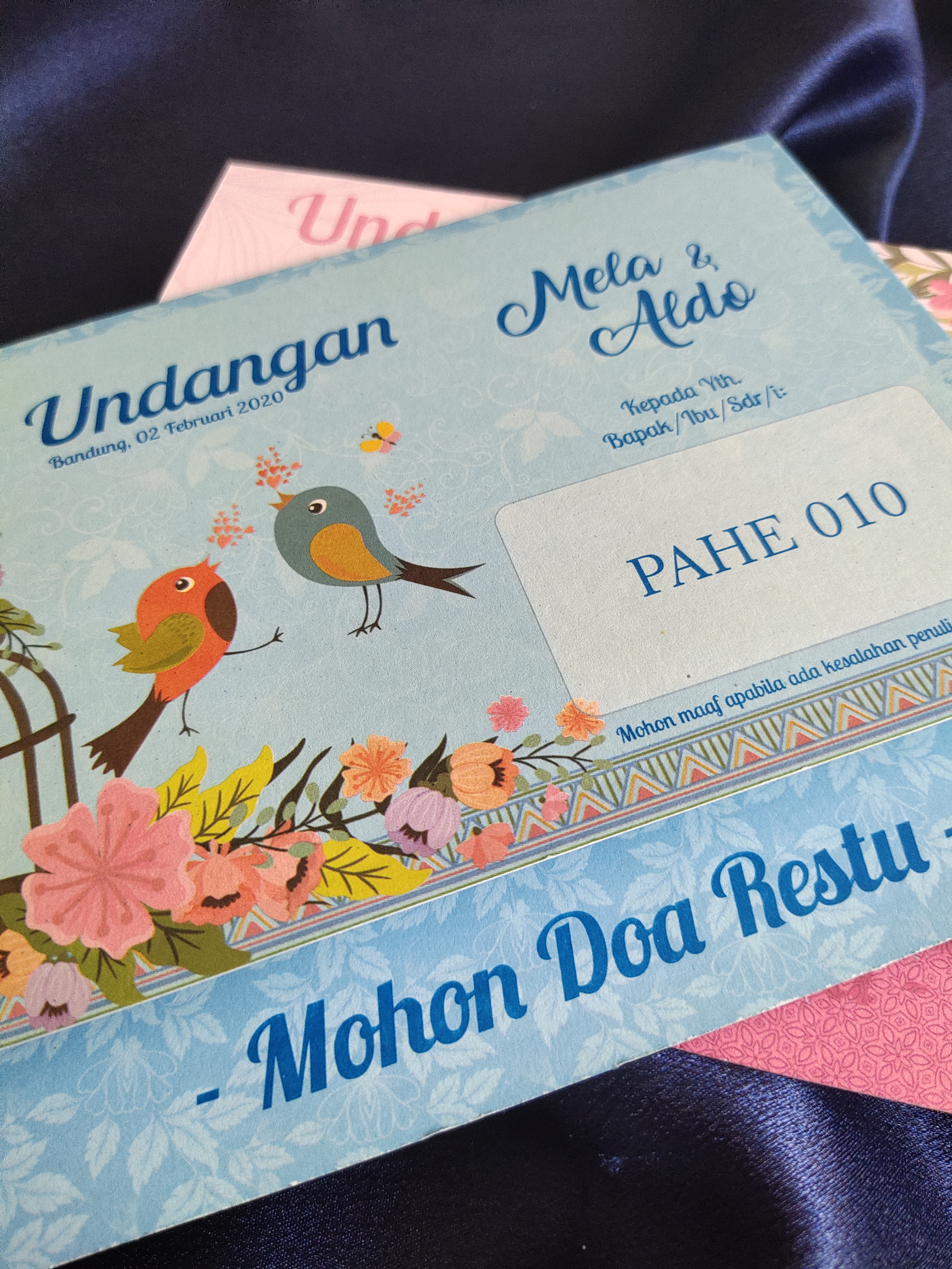 Contoh undangan blangko modern